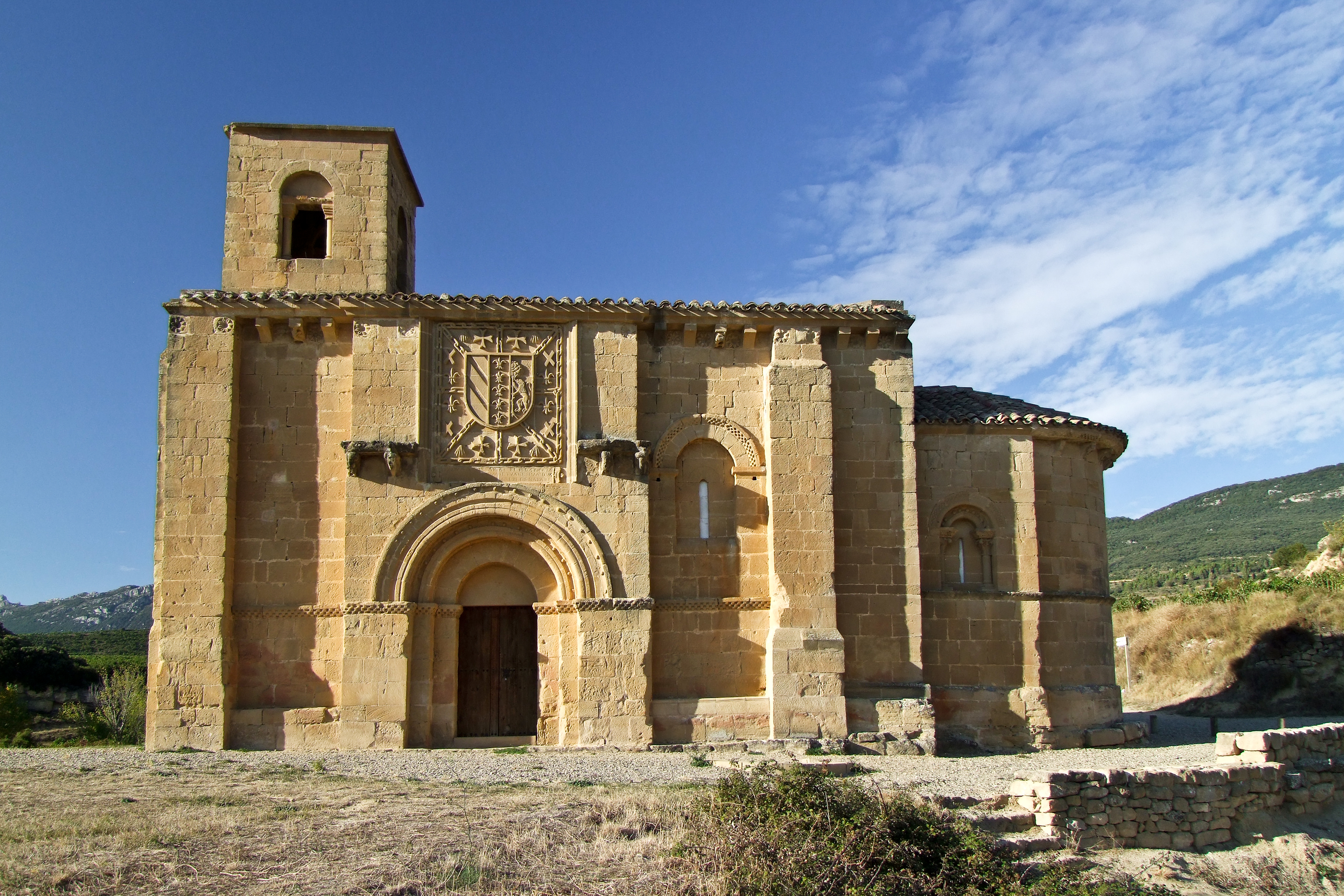 Ermita de Santa María de la Piscina en la localidad de Peciña, La Rioja - España